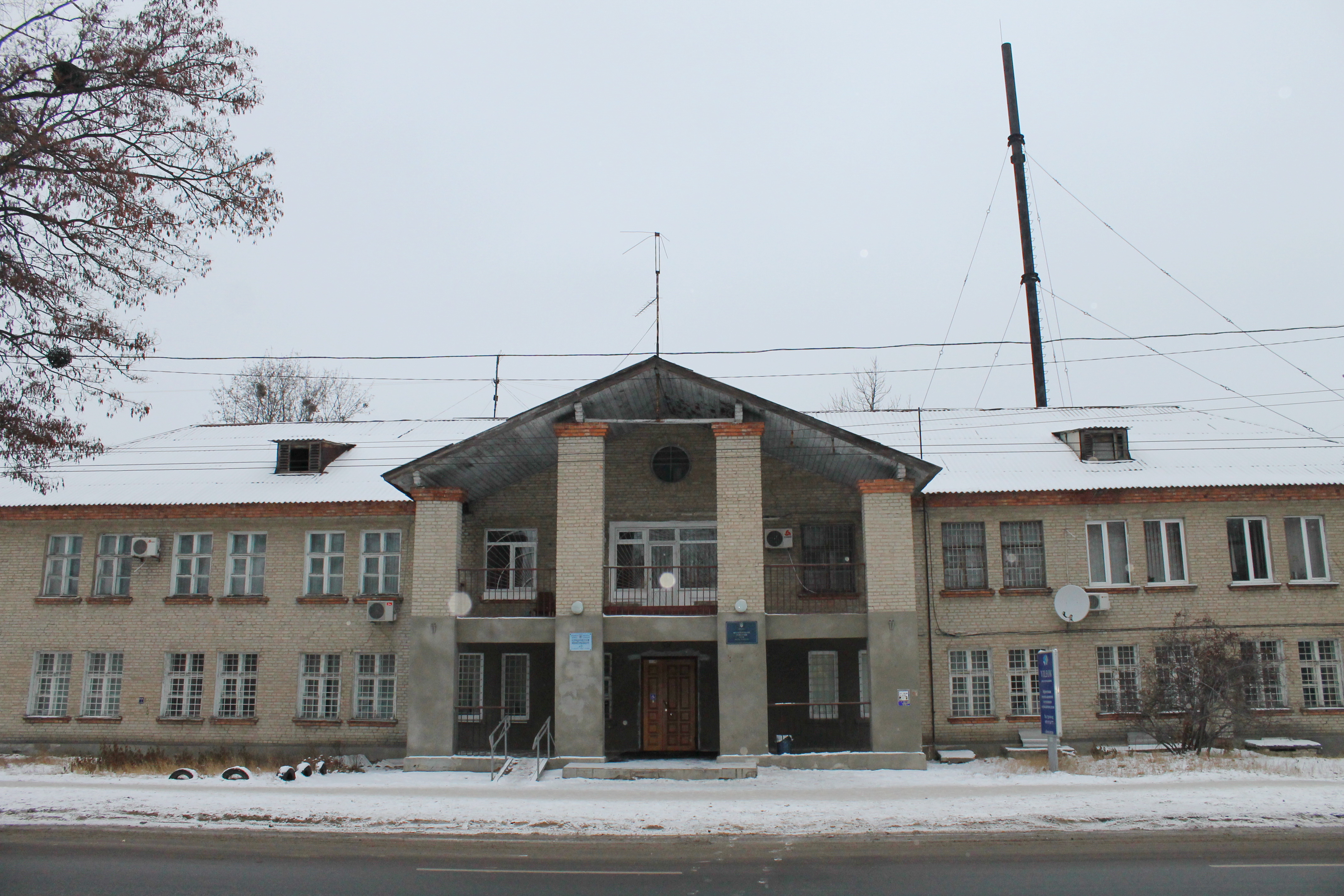 Фрунзенський районний суд міста Харкова по бульвару Богдана Хмельницького